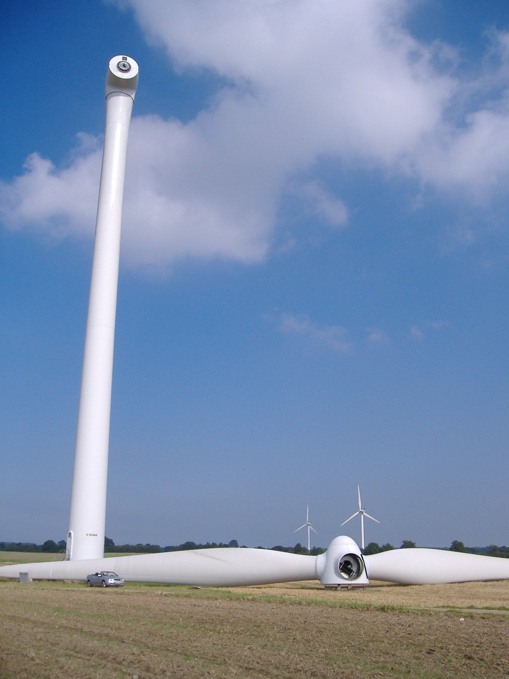 Windkraftanlage in Schleswig-Holstein – Eindruck von der Größe: unten steht ein PKW